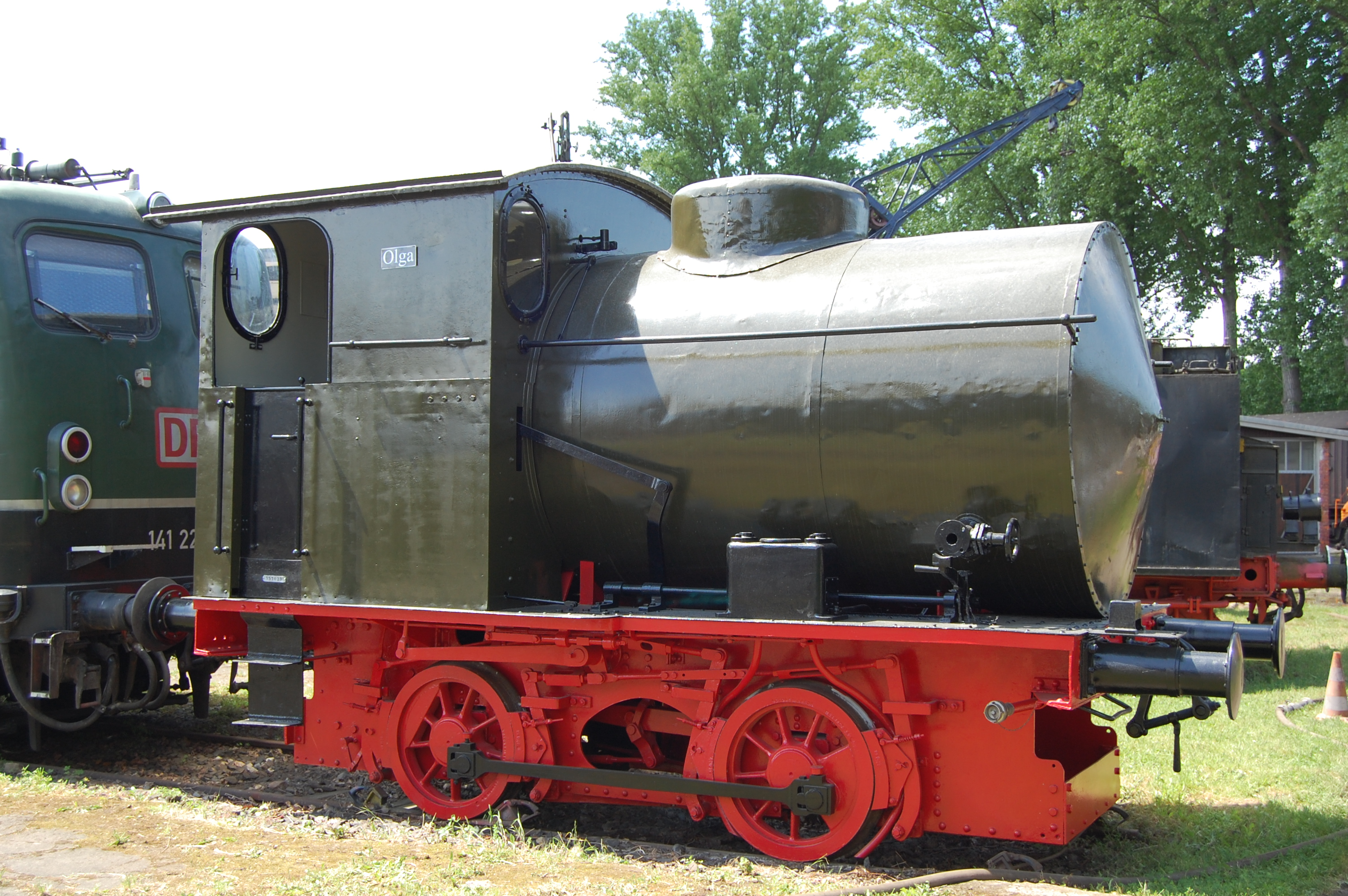 Feuerlose B-Lokomotive; Dampfspeicherlok von der Aktiengesellschaft für Lokomotivbau Hohenzollern. Baujahr 1911